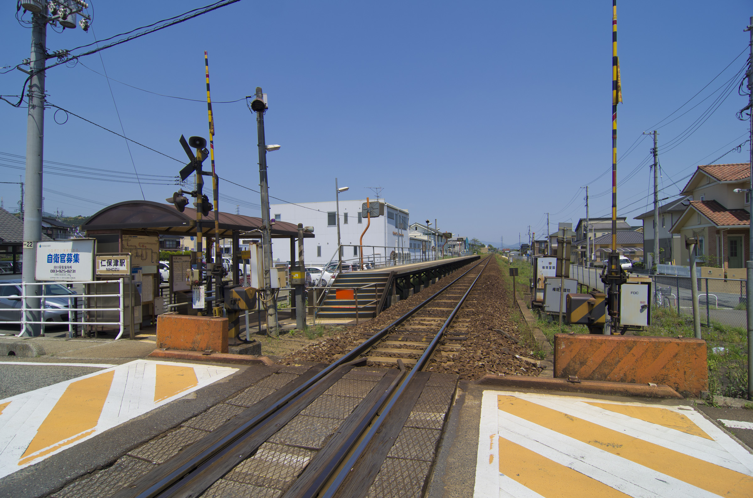 西日本旅客鉄道山口線仁保津駅全景